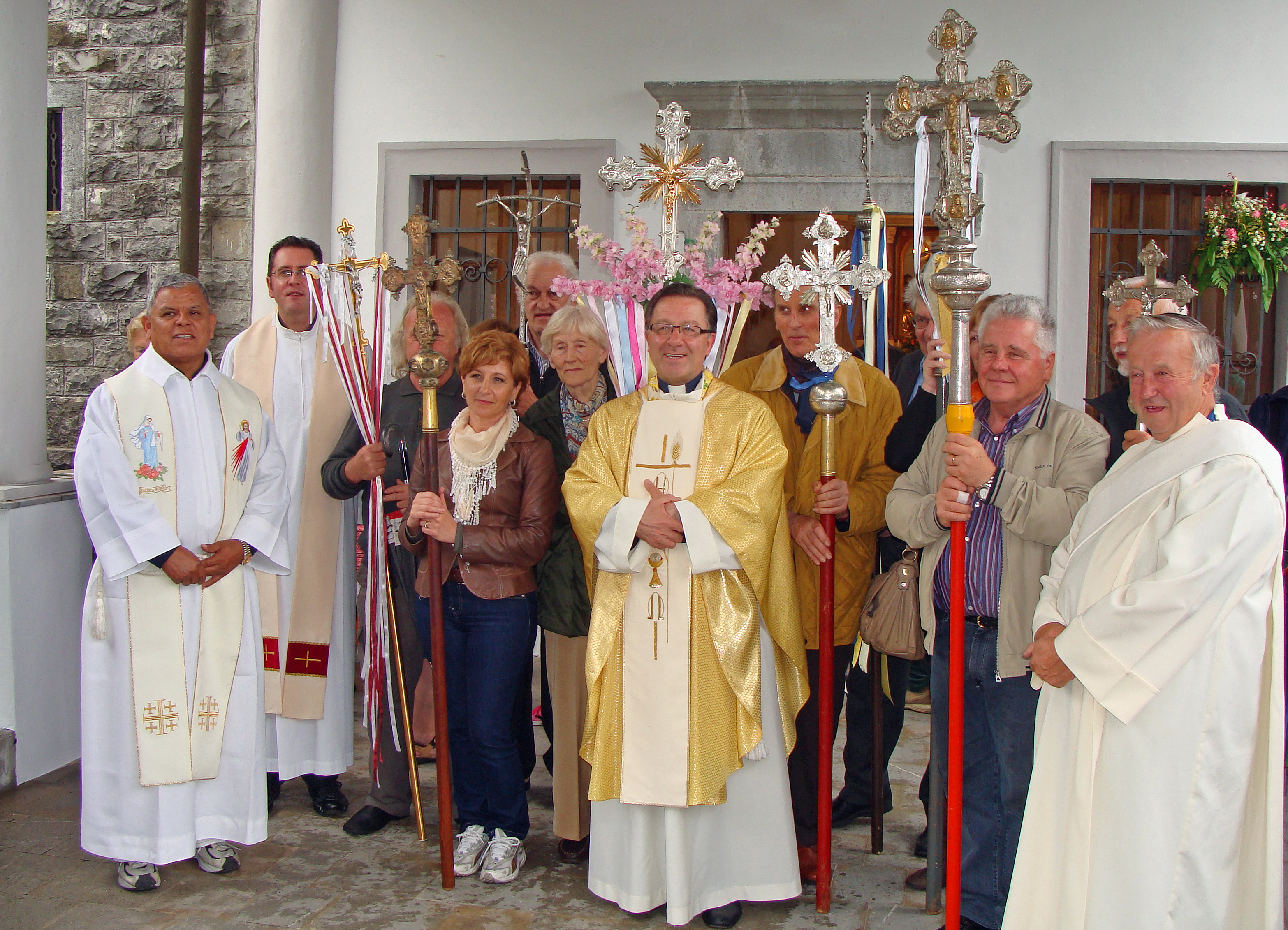 Fête religieuse traditionnelle se déroulant à Monetaperta (Italie) en juin, appelée "Bacio delle croci" (baiser des croix). Photo prise en 2012.